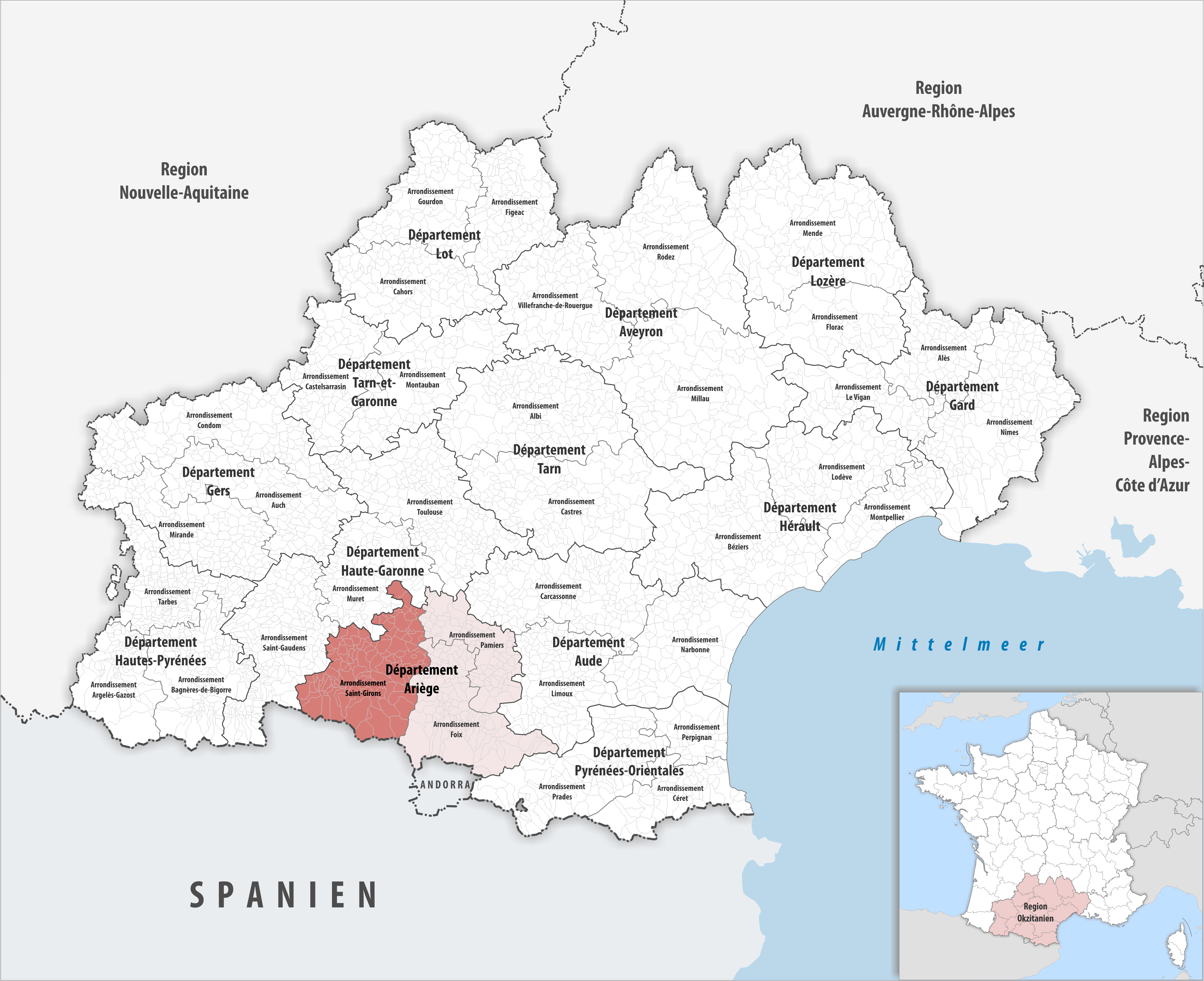 Lage des Arrondissements Saint-Girons